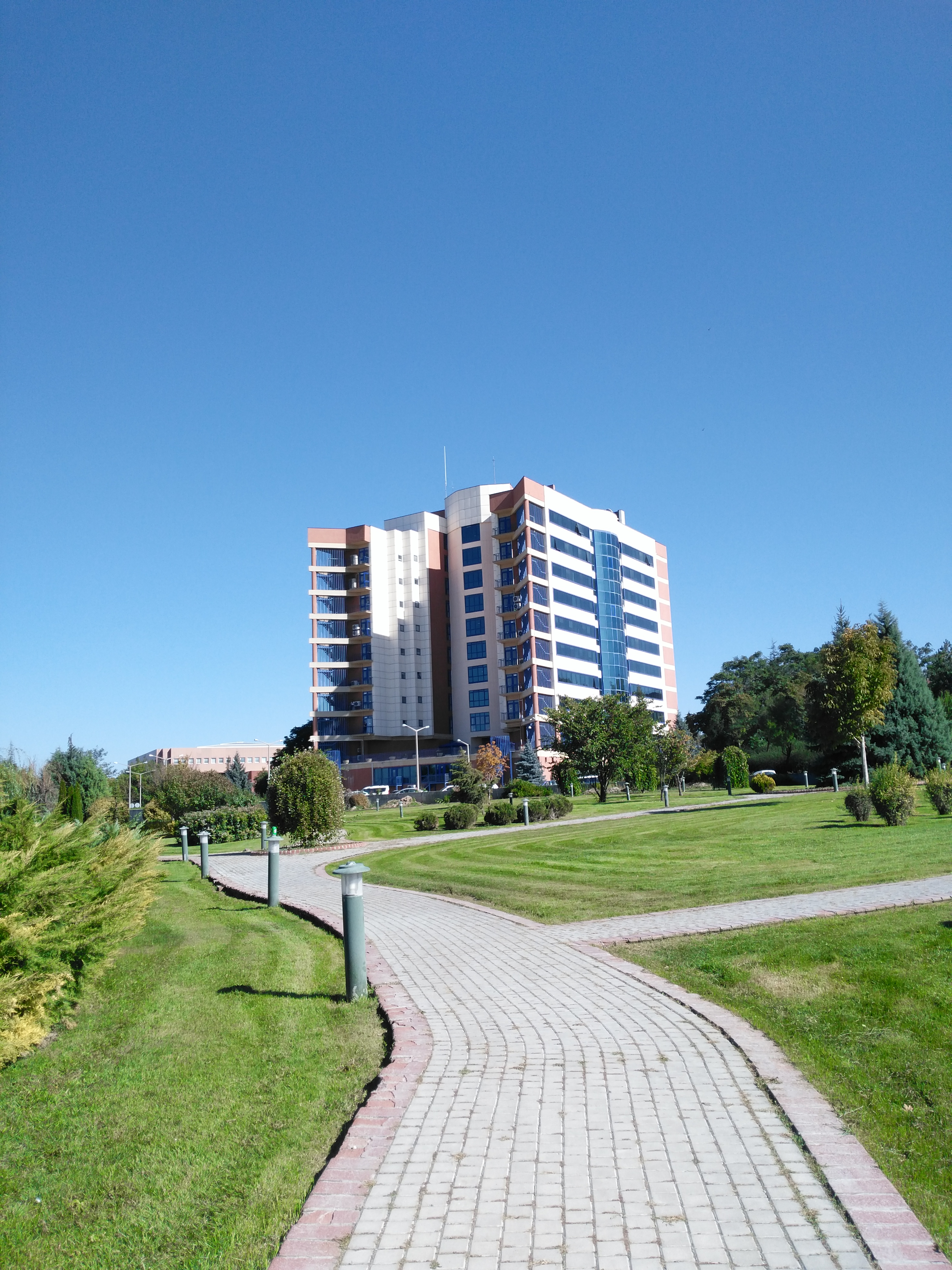 Anadolu Üniversitesi Açıköğretim Fakültesi Binası